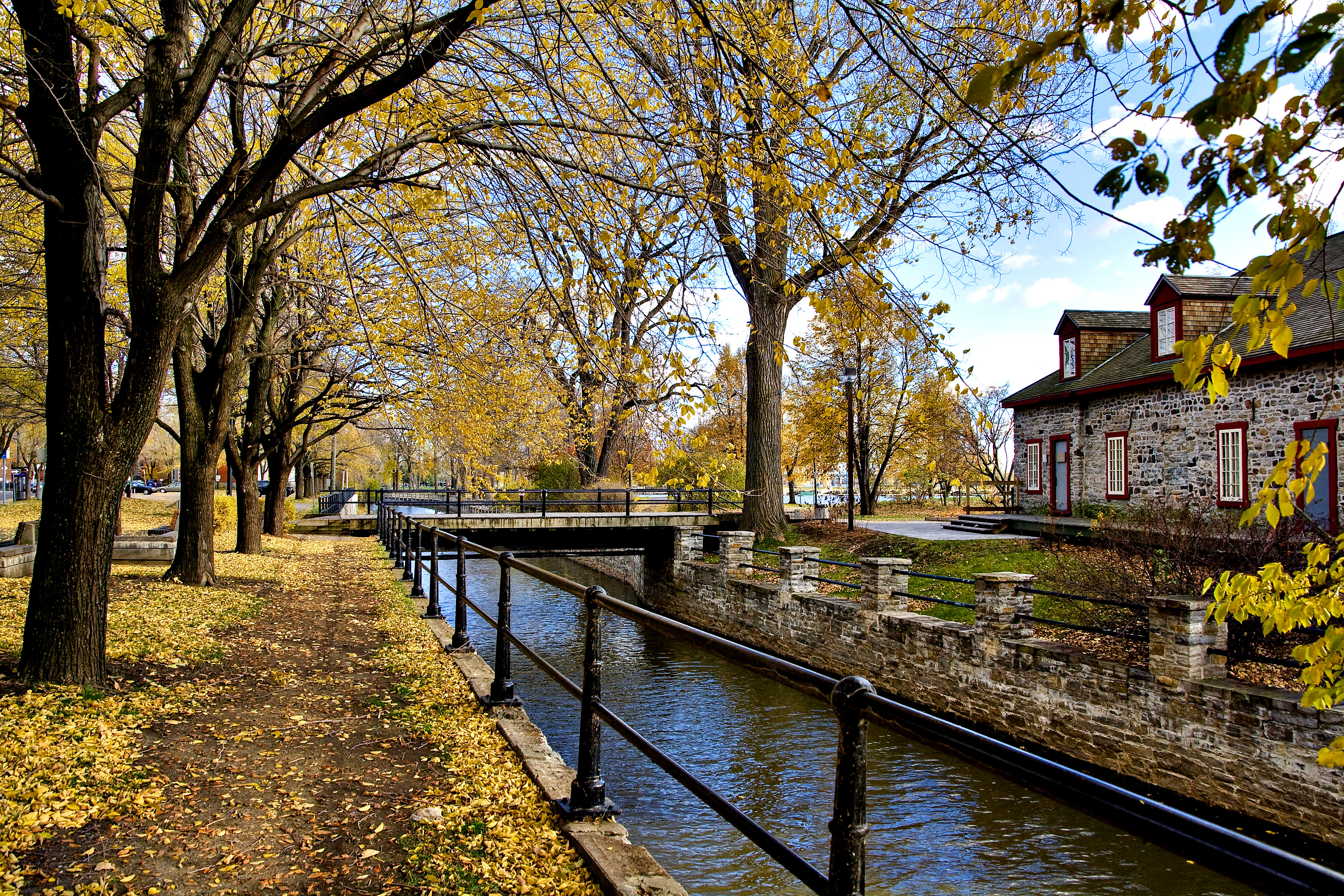 Lachine Canal in fall, Montreal